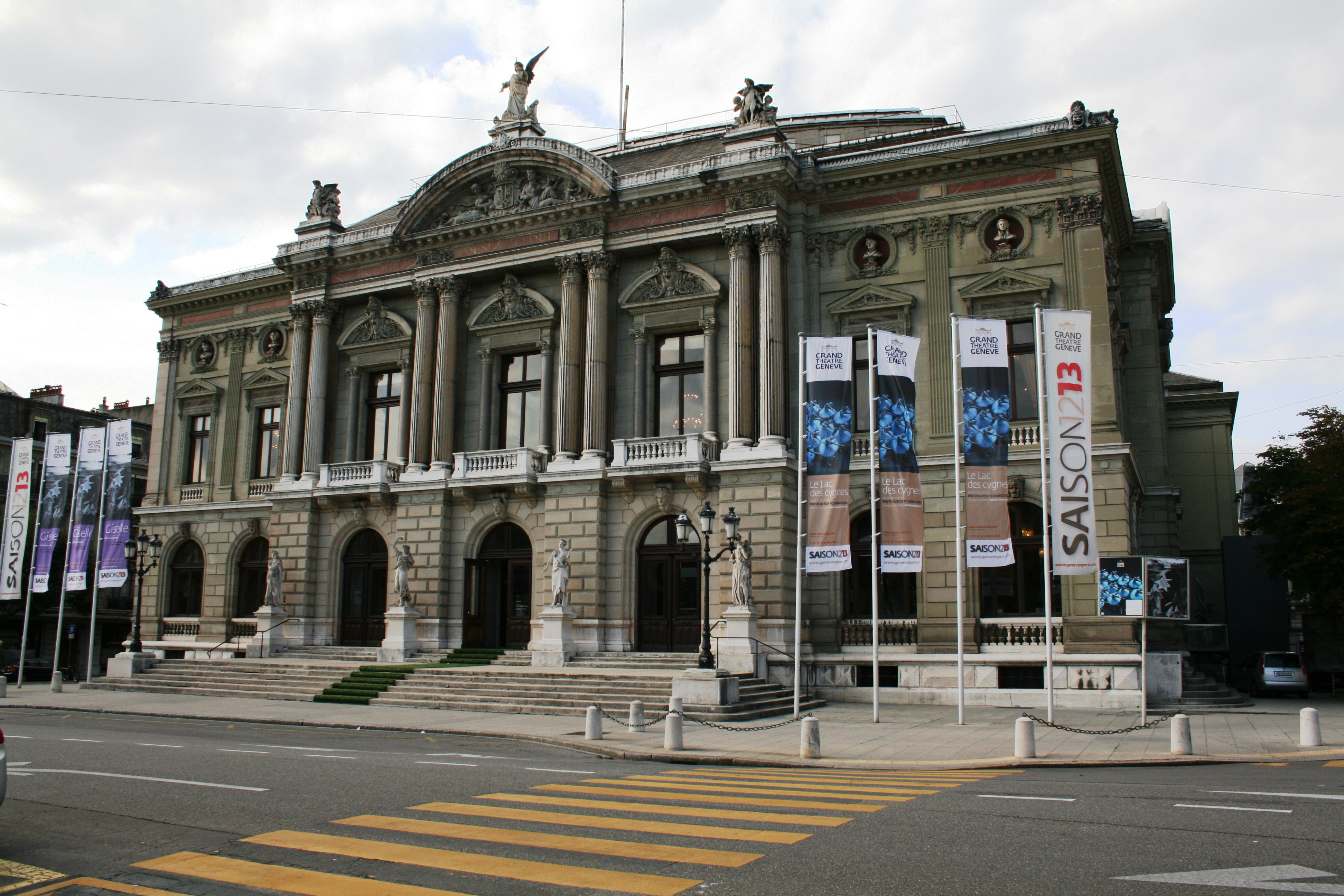 Vue de la façade principale du Grand Théâtre de Genève, donnant sur la place Neuve.